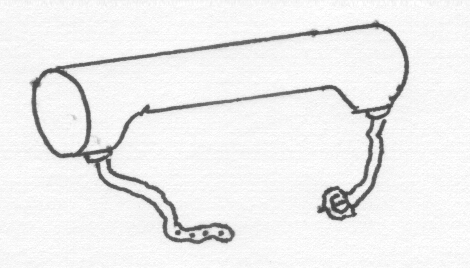 picture